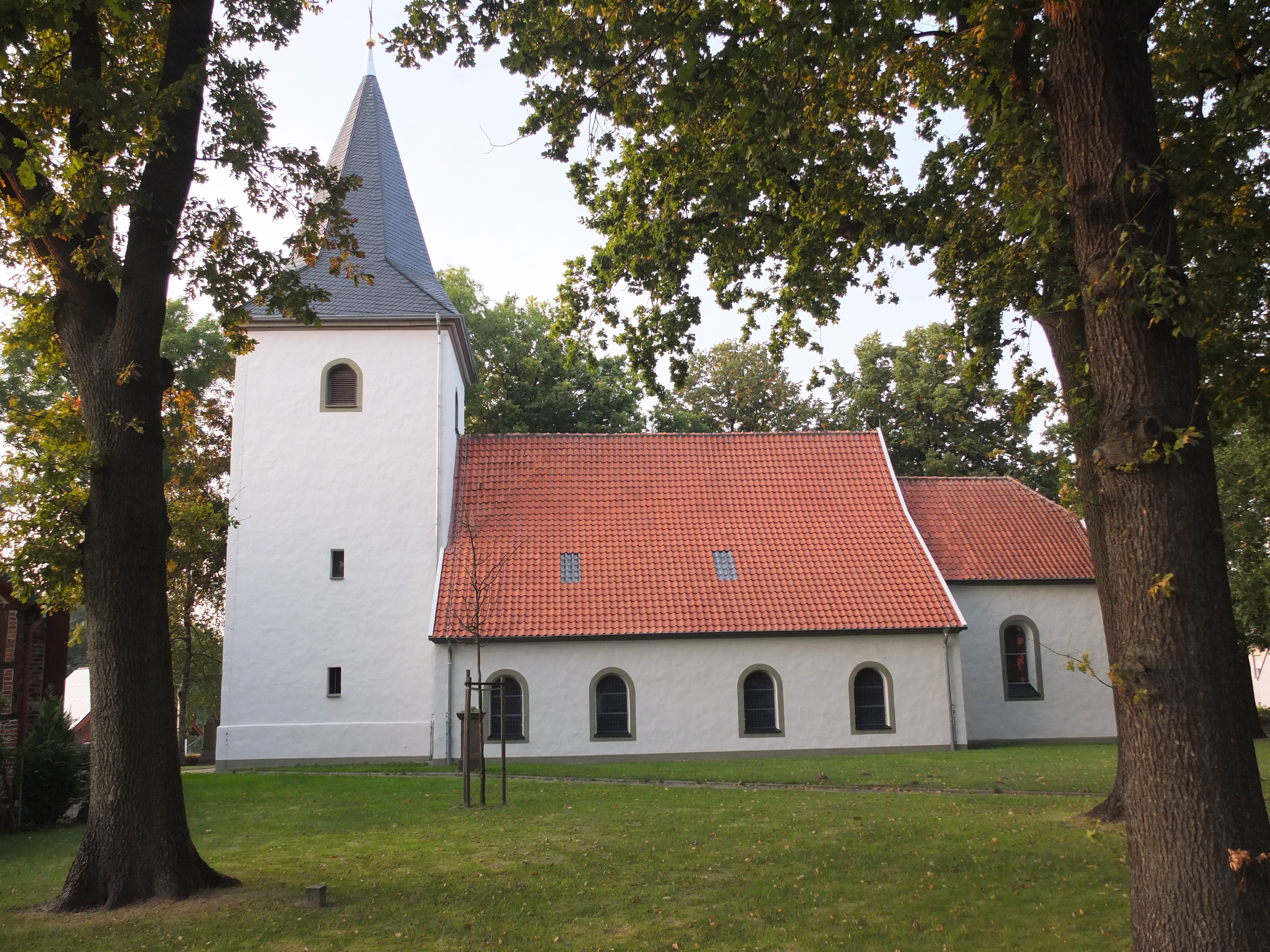 Soest-Meiningsen, St. Matthiaskirche, SüdseiteThis is a photograph of an architectural monument.It is on the list of cultural monuments of Soest